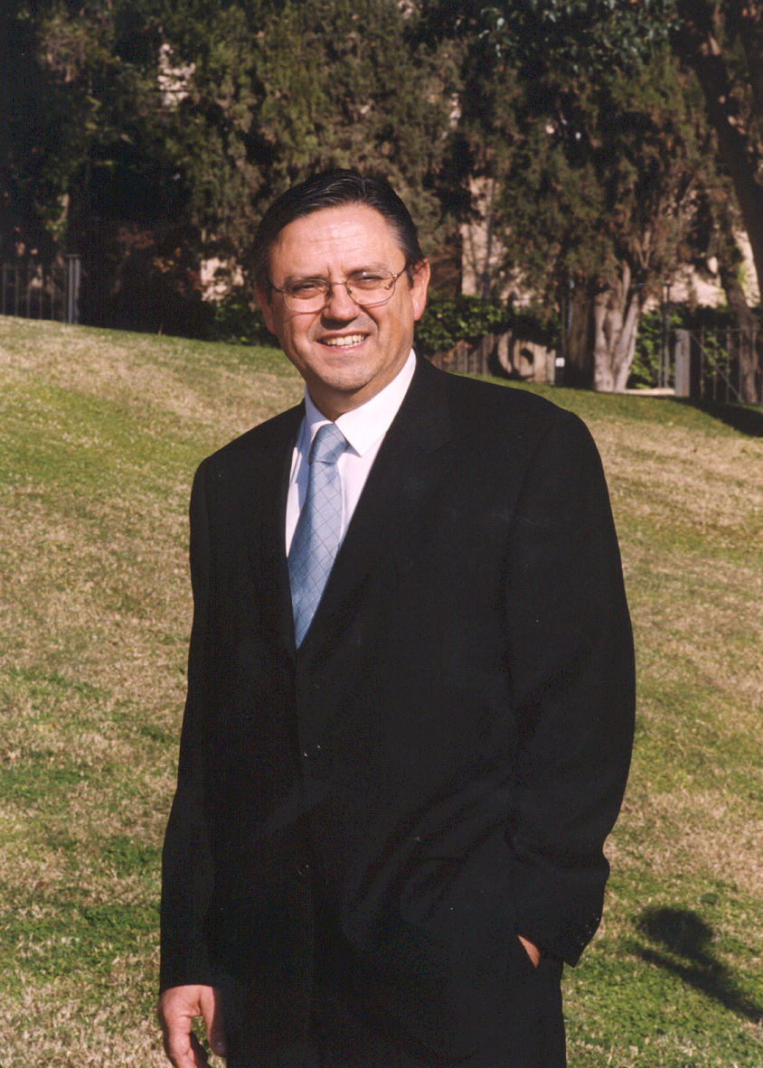 foto del Rector de la Universitat Internacional de Catalunya